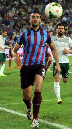 Essaid Belkalem - Trabzonspor / Bursaspor 0-0